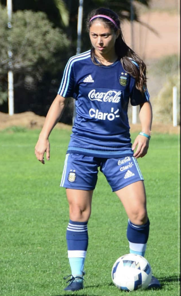 ትግርኛ: Picture